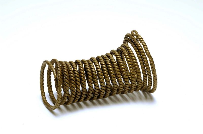 Armband. Uit twee koperdraden gedraaid.. Koperen vrouwenarmband Unknown language: Aja nitali